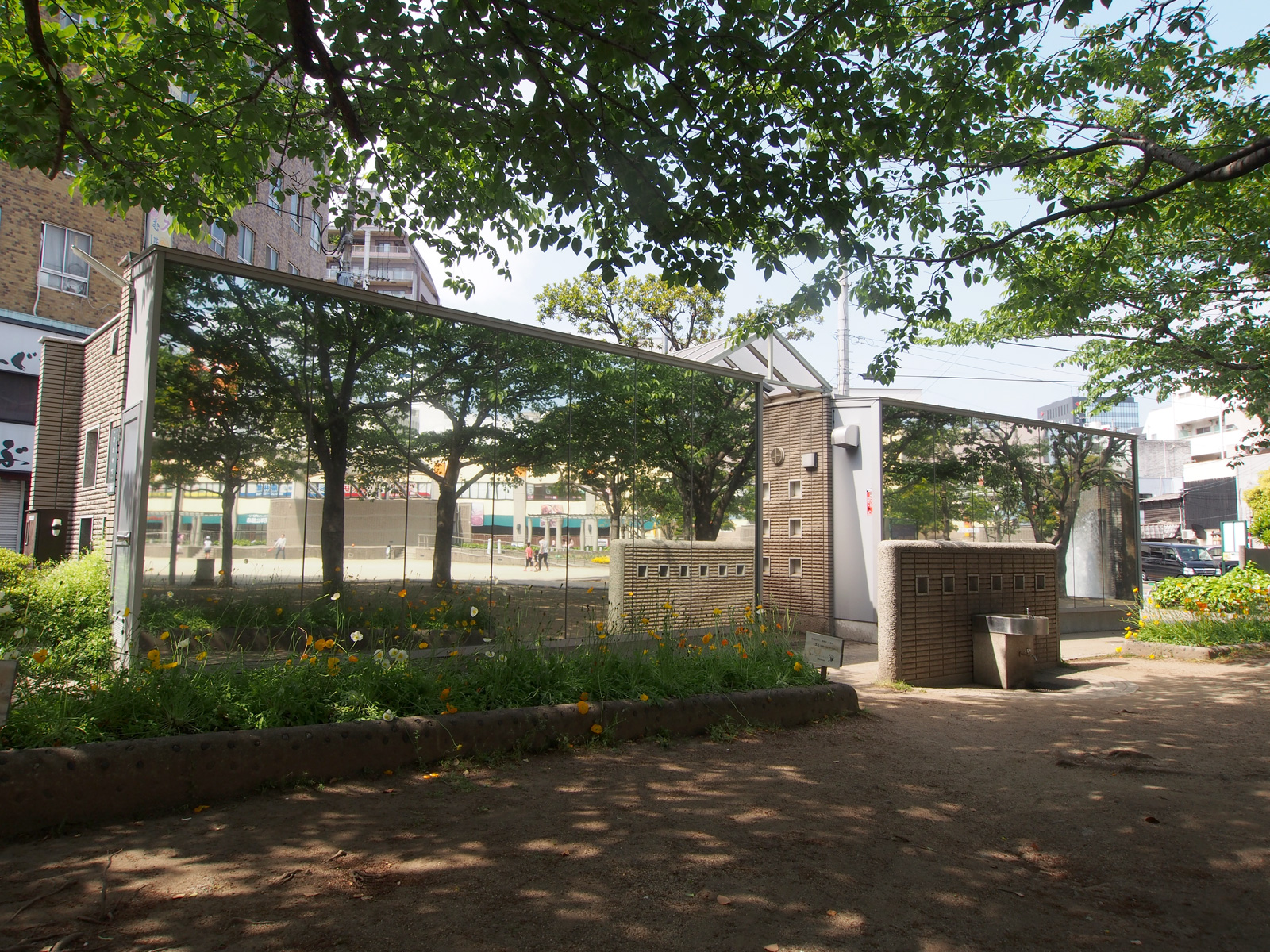 若草公園公衆トイレ（大分県大分市）